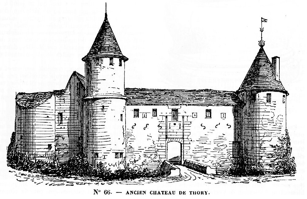 Thory (Yonne) : le château (dessin de Victor Petit, 1870)